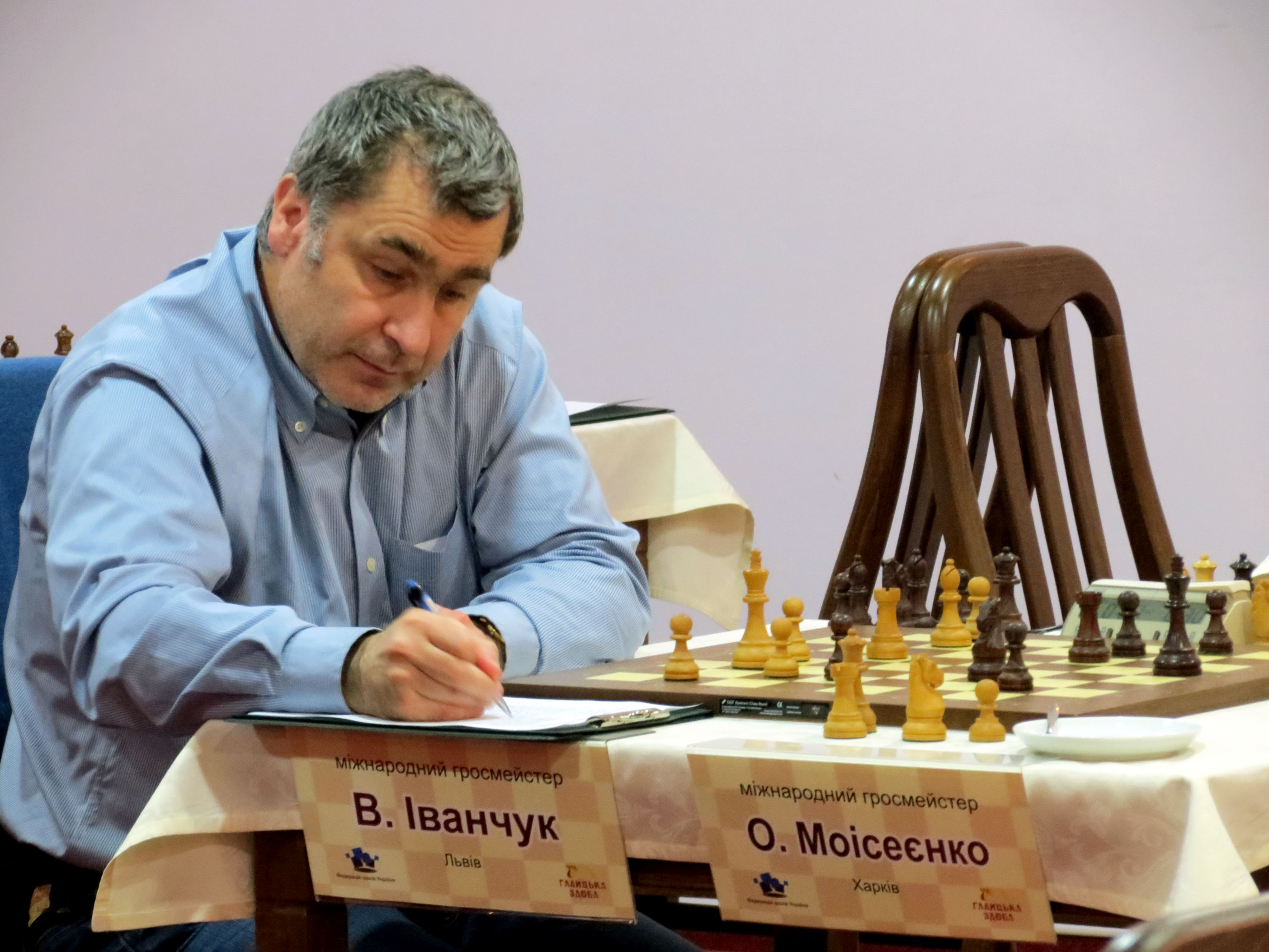 Василь Іванчук (чемпіонат України 2014 року)